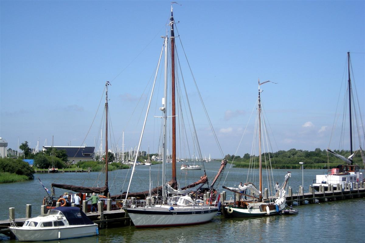 Makkum, het Makkumerdiep richting het IJsselmeer.